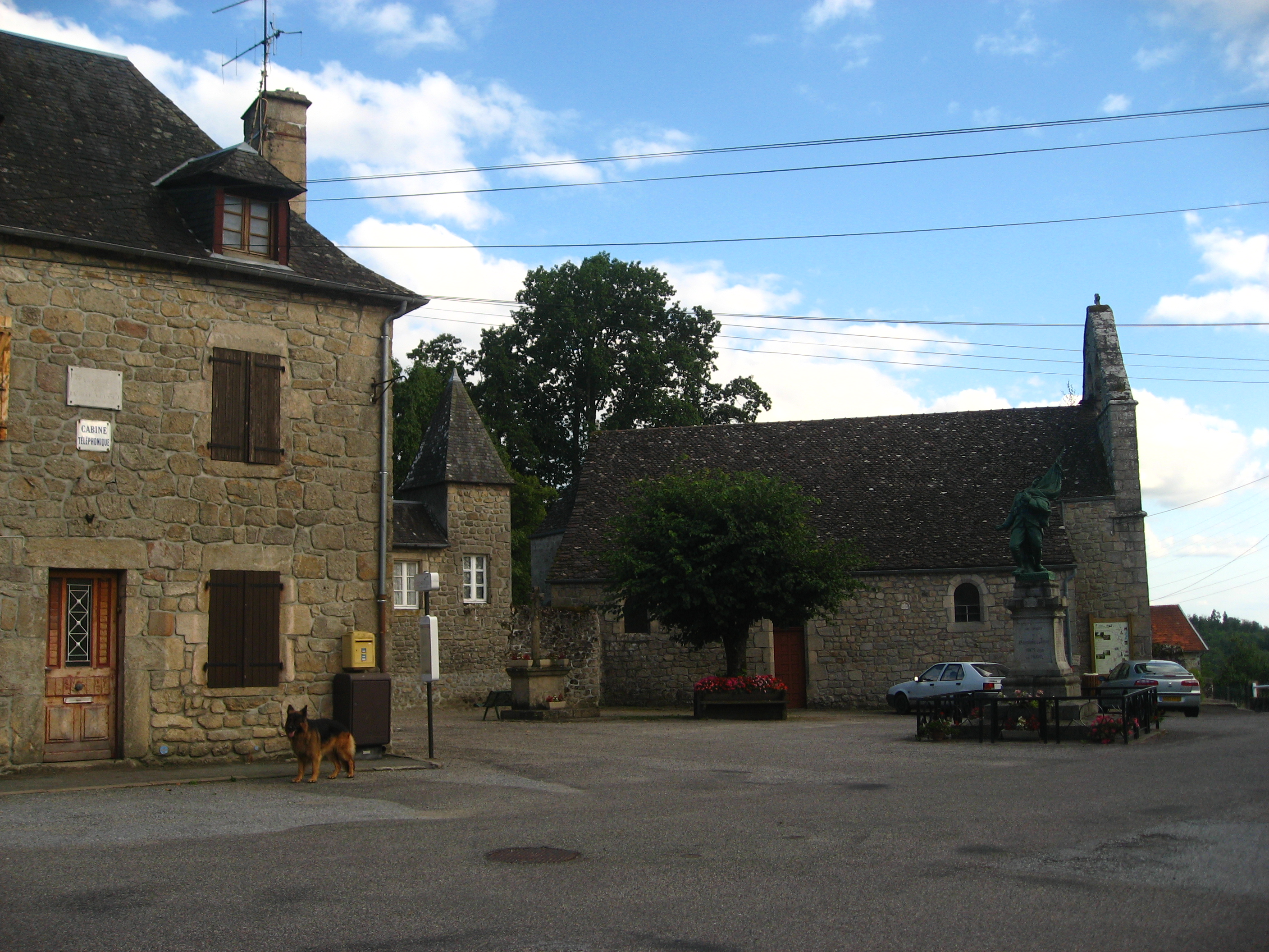 Commune de Champagnac-la-Prune dans le département de la Corrèze (19) en France